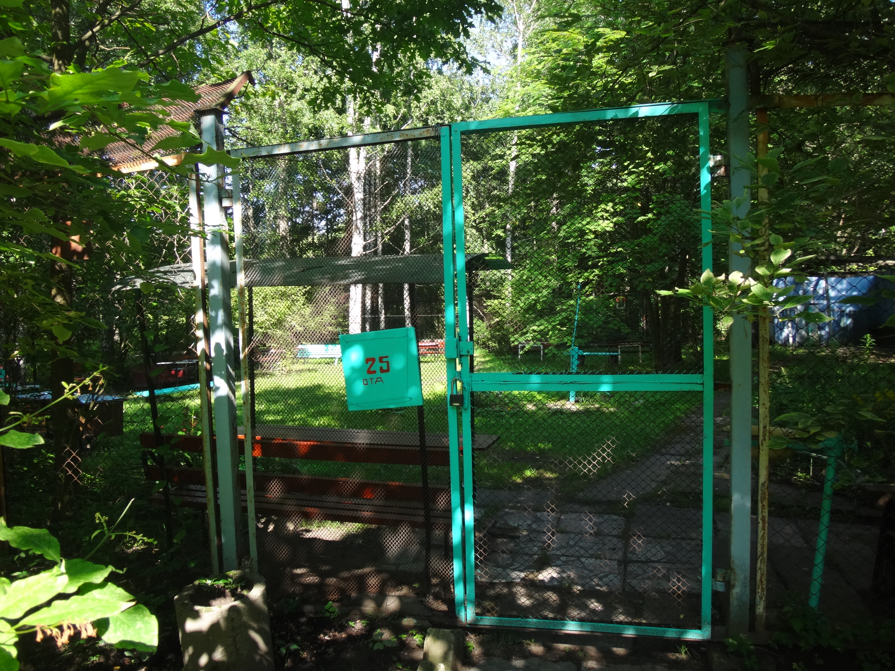 Прогулочный садок для пациентов больницы, называемый в народе "загоном"